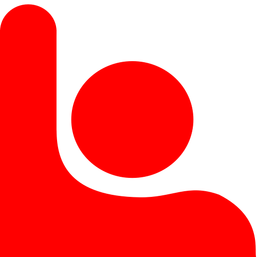 Логотип студентської профспілки "Пряма дія"